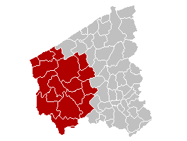 Westhoek in Belgium